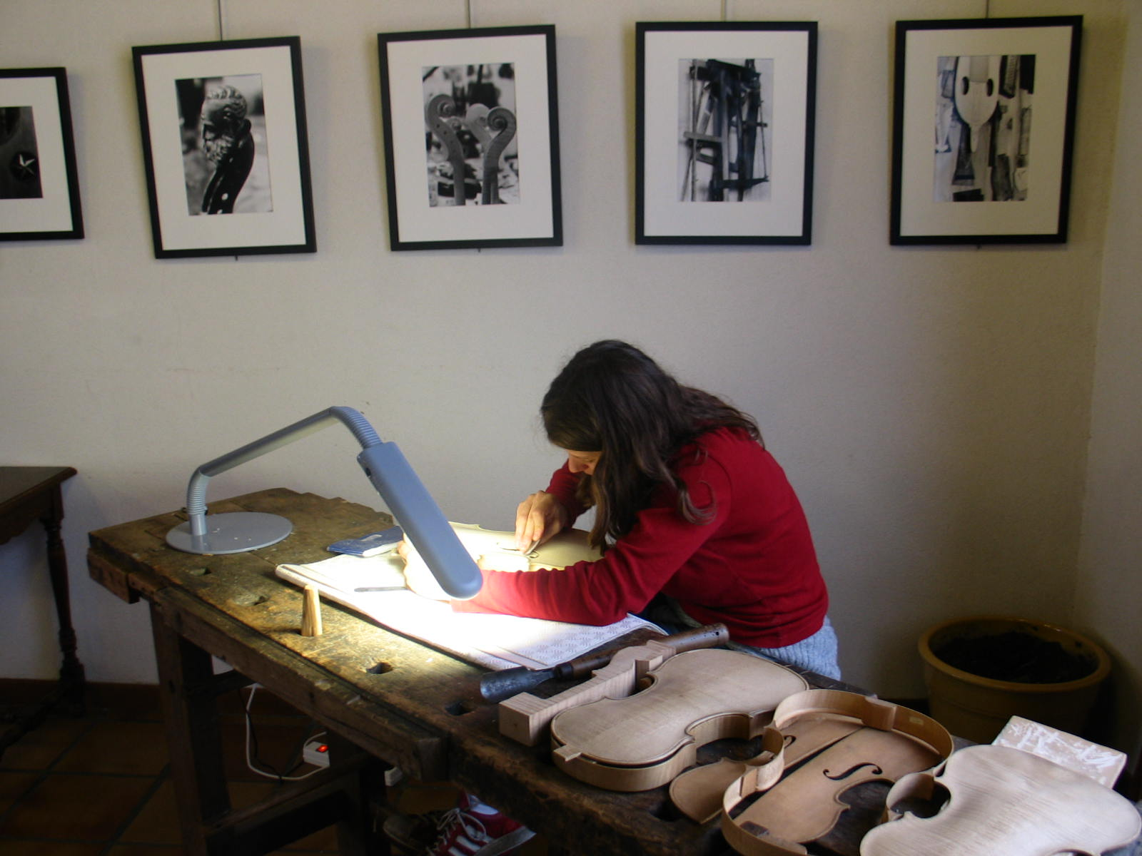 Démonstration par un élève luthier lors de la fête du patrimoine en 2004.